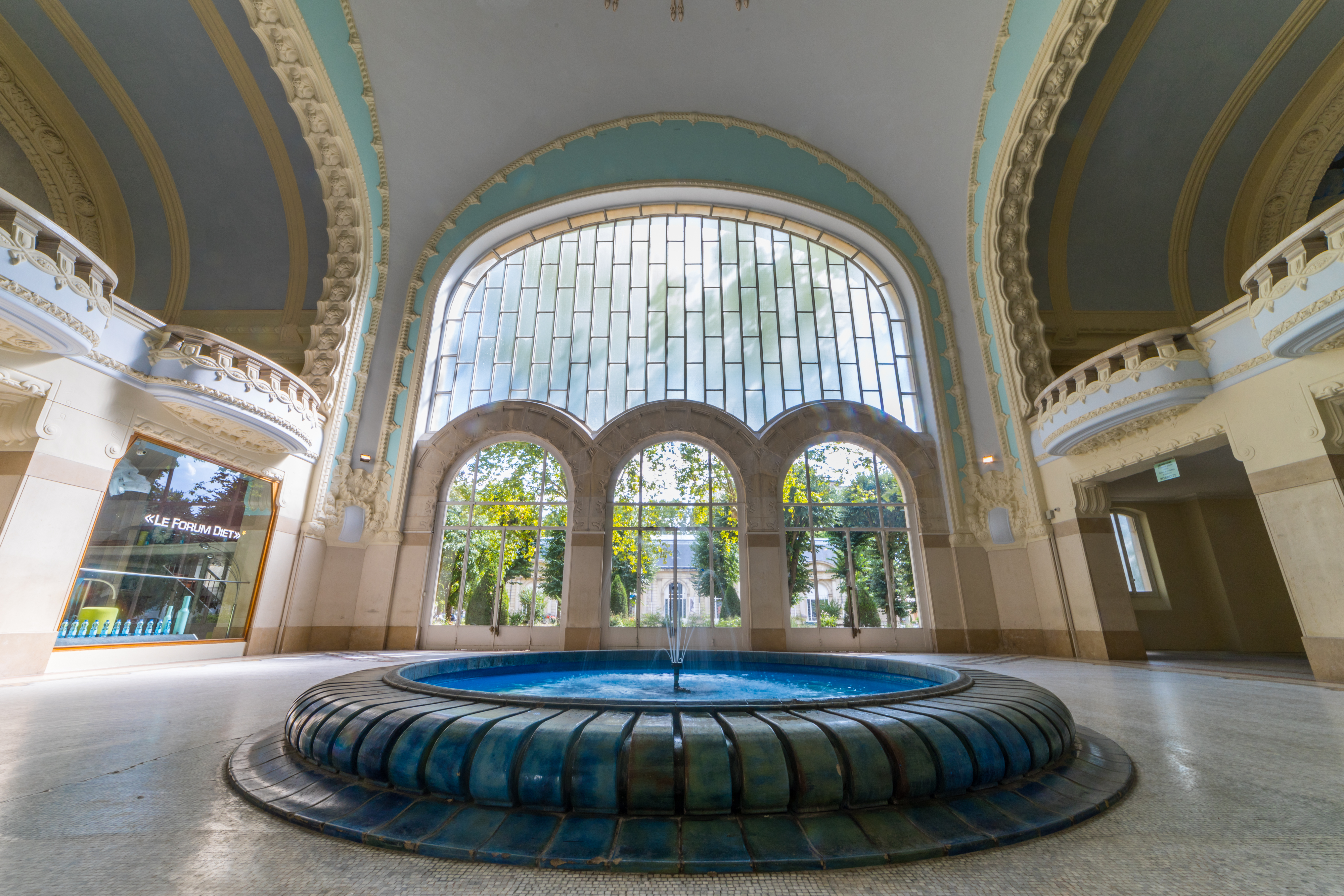 Vue de la source à l'intérieur du dôme d'inspiration oriental